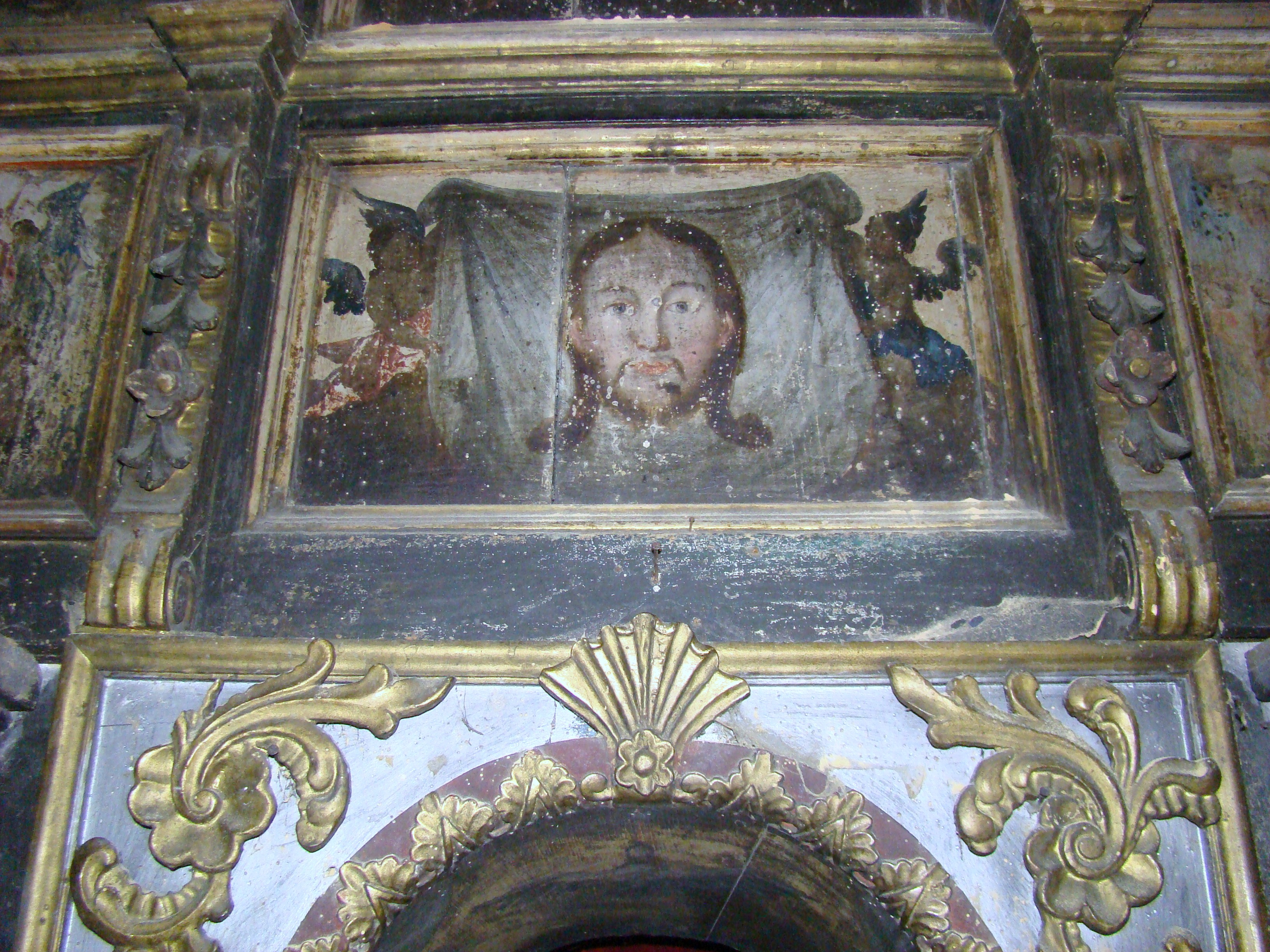 Biserica de lemn "Sfântul Nicolae", sat VALEA CHIOARULUI